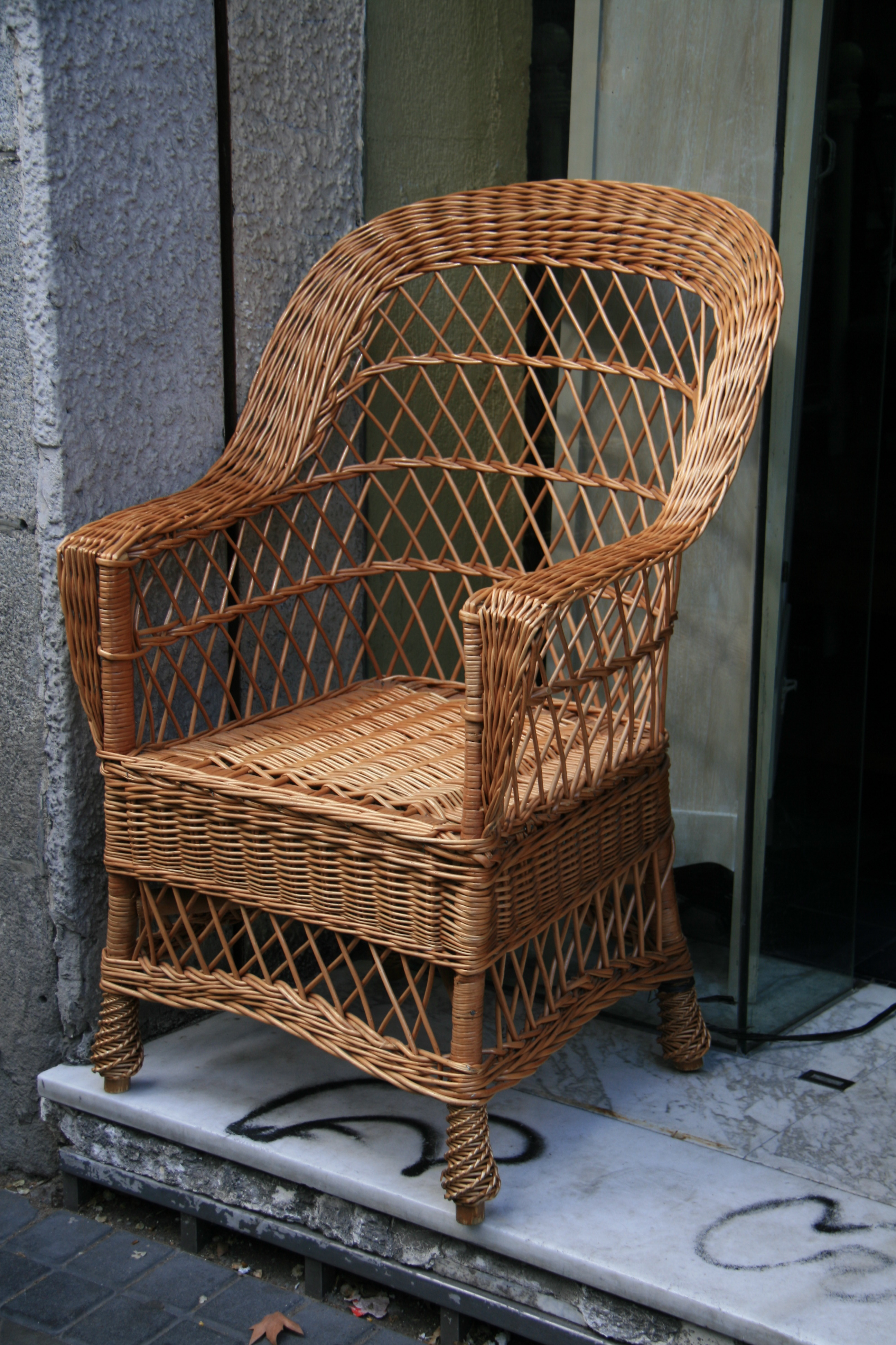 Silla - Silón